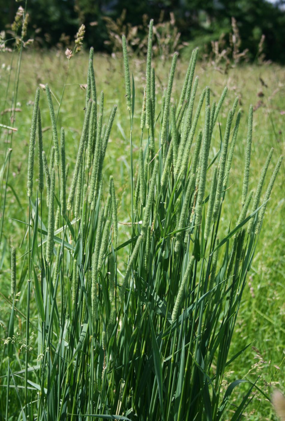 Wiesen-Lieschgras (Phleum pratense), Süßgräser (Poaceae) - Österreich/Austria/Autriche: Oberösterreich, Hausruckviertel, Niederholzham N Schwanenstadt